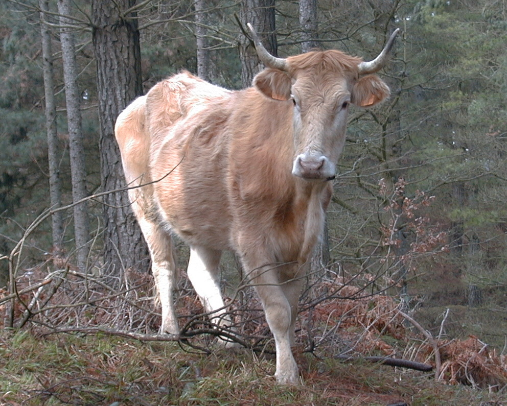 Betizu bat Elgeako mendizerran. Araba